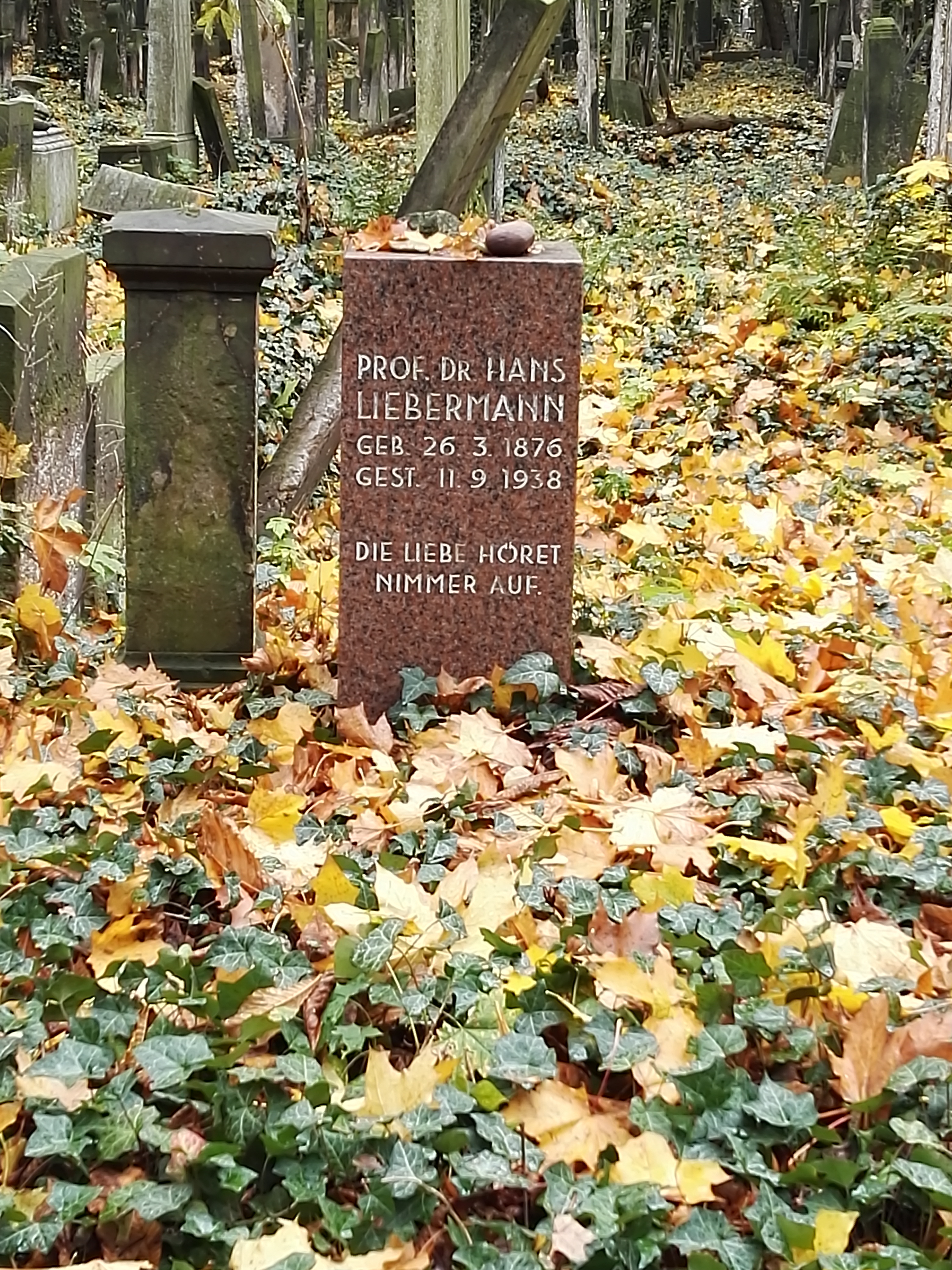 Grab von Hans Liebermann auf dem Jüdischer Friedhof Schönhauser Allee in Berlin-Prenzlauer Berg